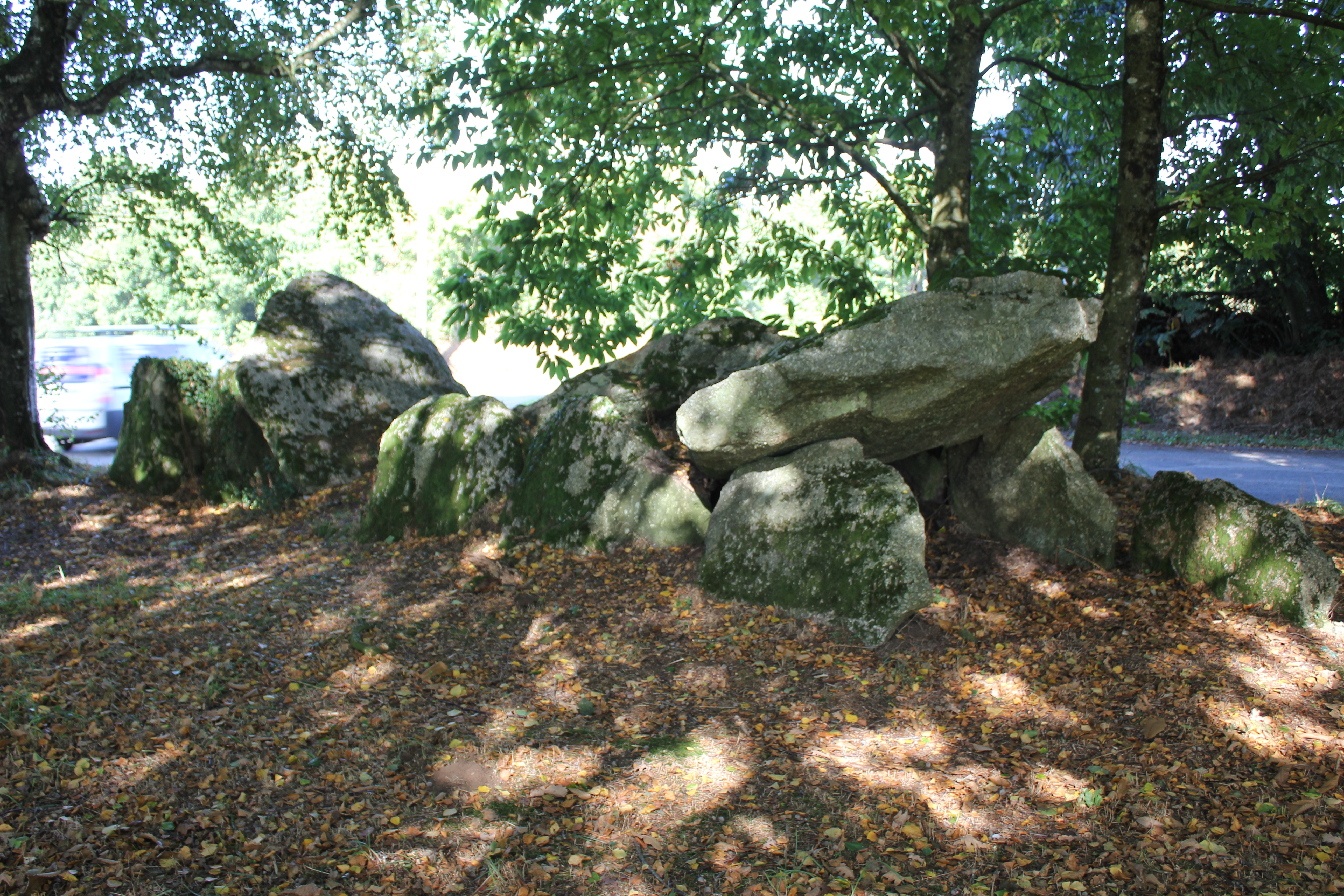 Allée couverte de Kergonfalz, à Bignan, Morbihan, France. .